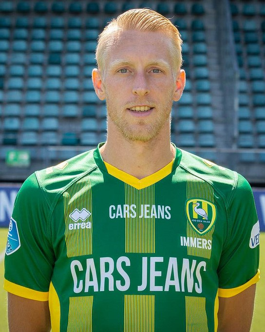 Lex Immers